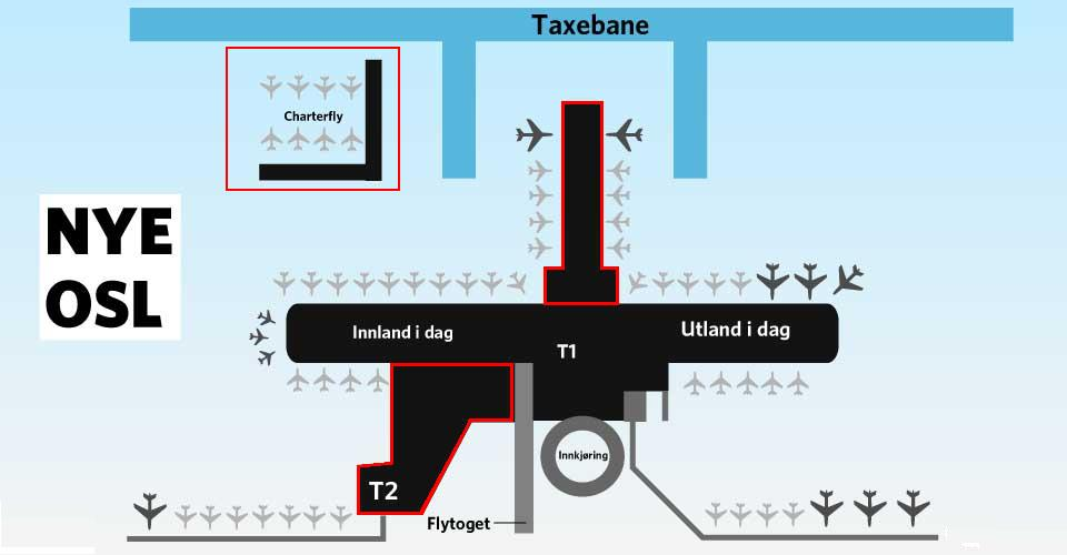 Slik ser Avinor for seg Gardermoen vil se ut i 2012. T2 Blir Navnet på den nye terminalen.